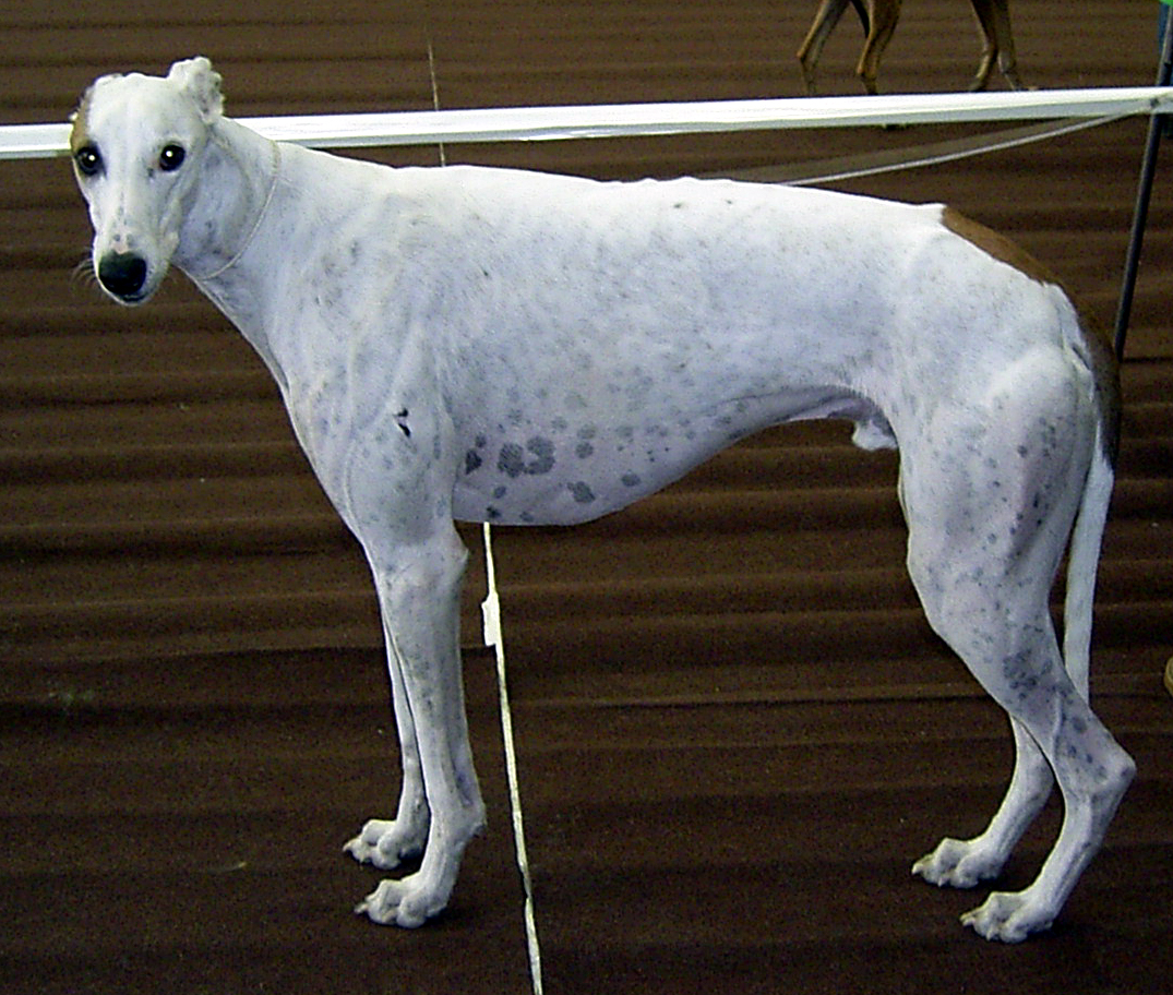 Greyhound